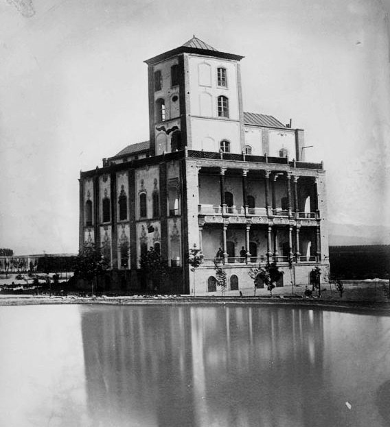 ساختمان و عمارت مسکونی ظل‌السلطان در ميدان بهارستان تهران در دوران ناصرالدین‌شاه قاجار